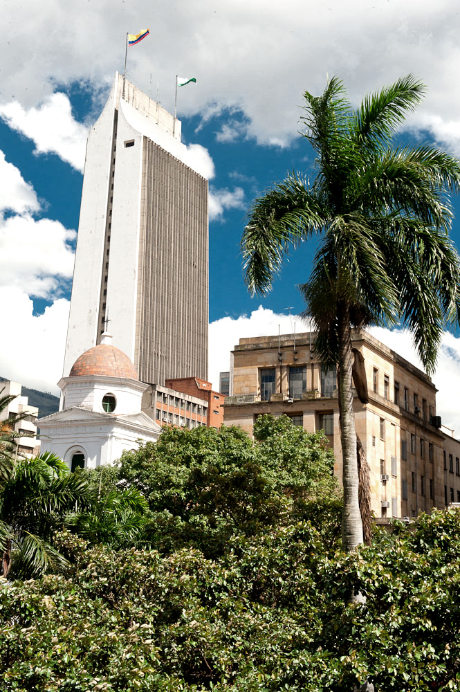 Aspecto del Edificio Coltejer y la Basílica Menor de Nuestra Señora de la Candelaria en Medellín, desde la Estación Parque Berrío del metro.